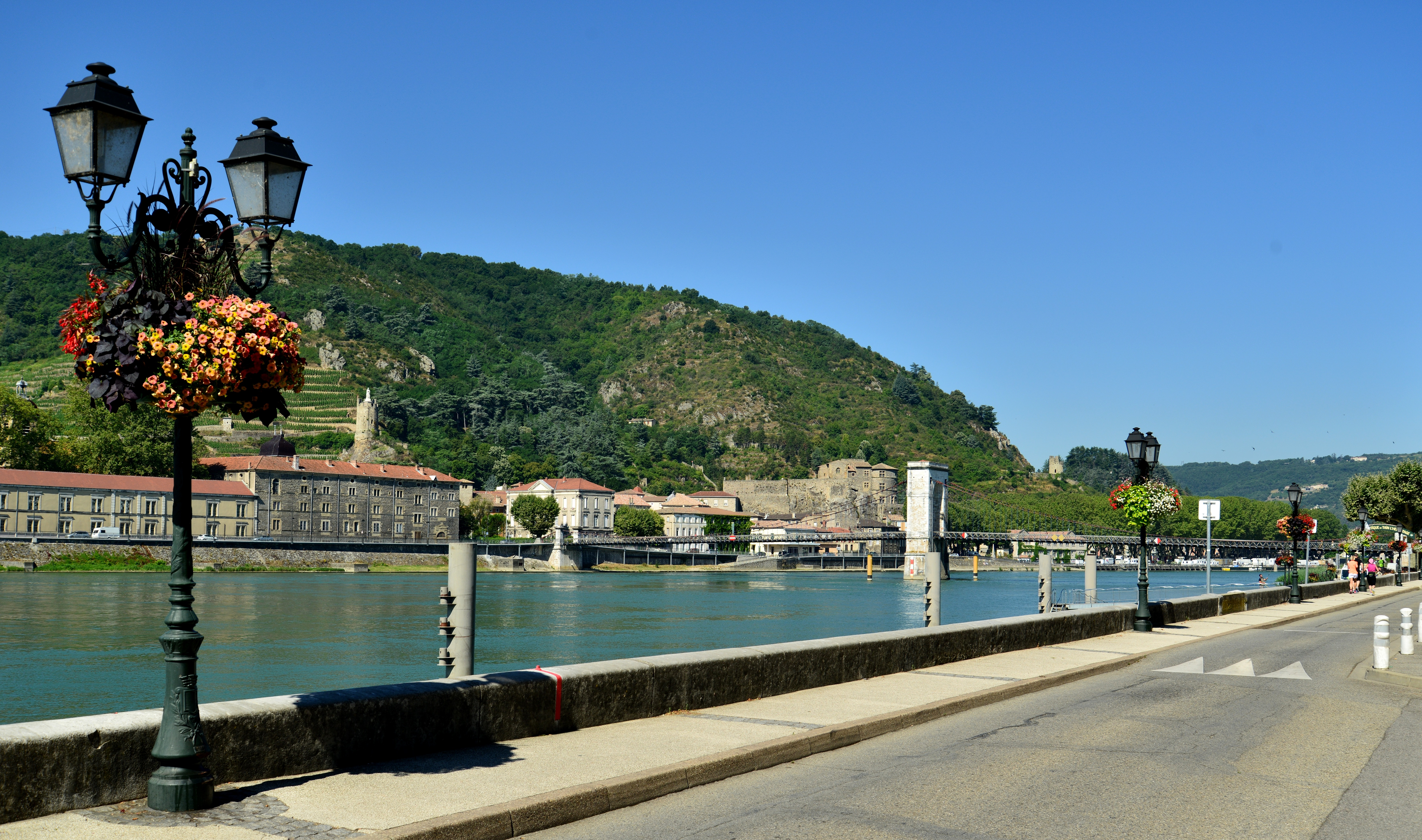 ville de Tournon depuis la rive gauche du Rhône